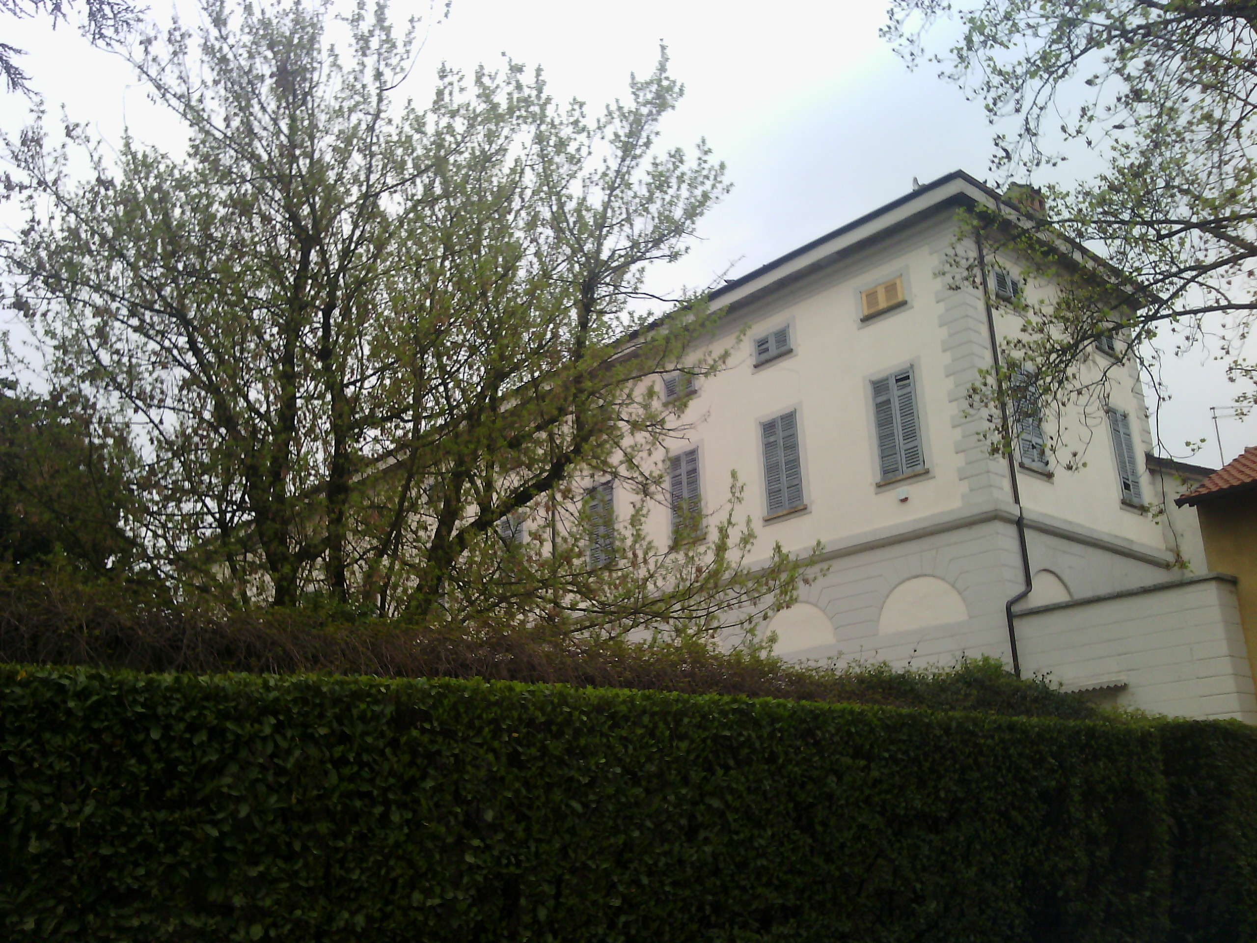 Villa Magnaghi a Marcallo con Casone (MI) - Italy